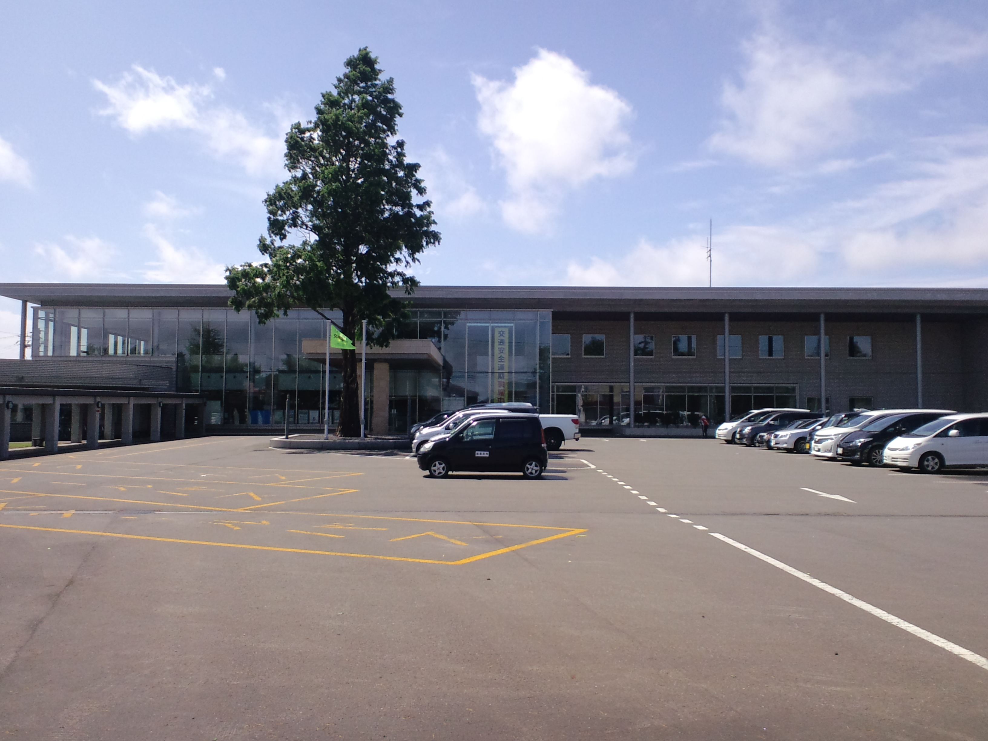 岩見沢市役所・北村支所